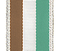 Grafika Korporacji Akademickiej Sarmatia ( Jako czlonek Sarmatii mam prawo i zezwolenie na umieszczanie wszelkich zdjec i grafik tej organizacji. (Czestomir)